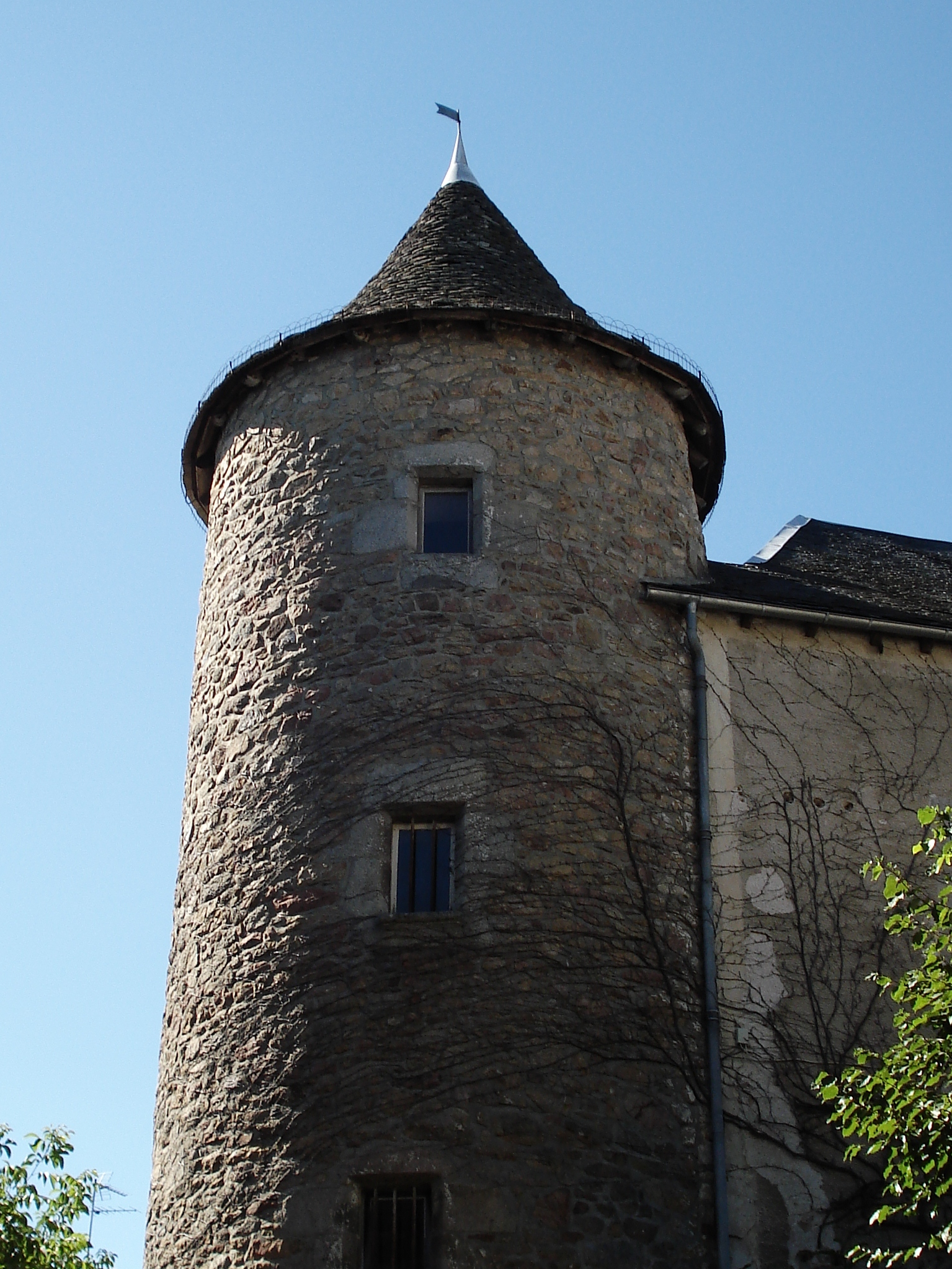 Neuvic en Corrèze : la Tour Veilhan